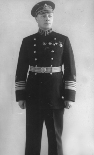 Нарком ВМФ СССР Николай Герасимович Кузнецов. 1939 г.